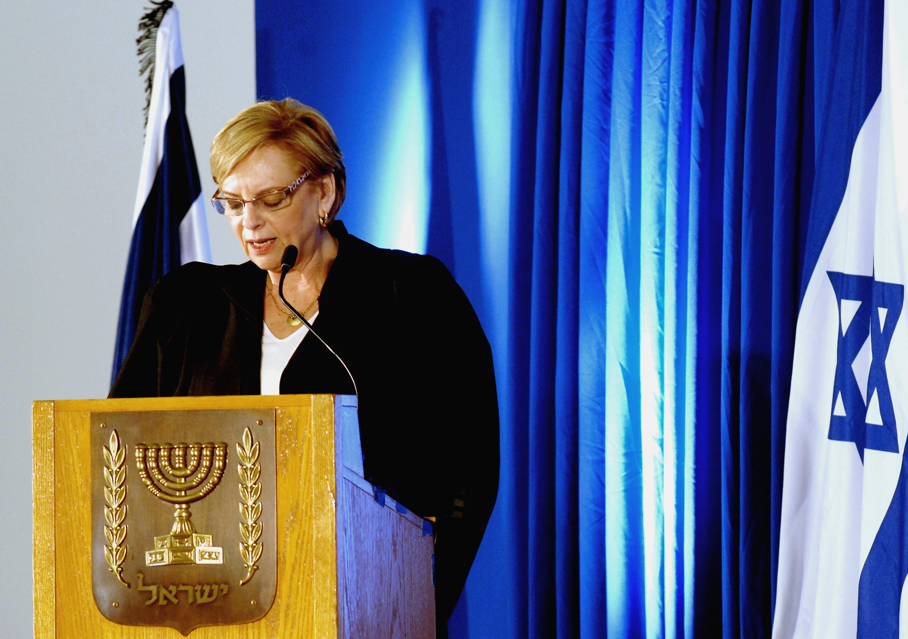 The swearing-in ceremony for incoming supreme court president Dorit Beinish at the Chagall hall, Knesset in Jerusalem. in the Photo: Beinish Declaring Allegiance (14/09/2006) טקס ההשבעה של נשיאת בית המשפט העליון, דורית בייניש, באולם שאגאל בכנסת ירושלים. בתמונה: בייניש נשבעת אמונים Photo: OHAYON AVI.